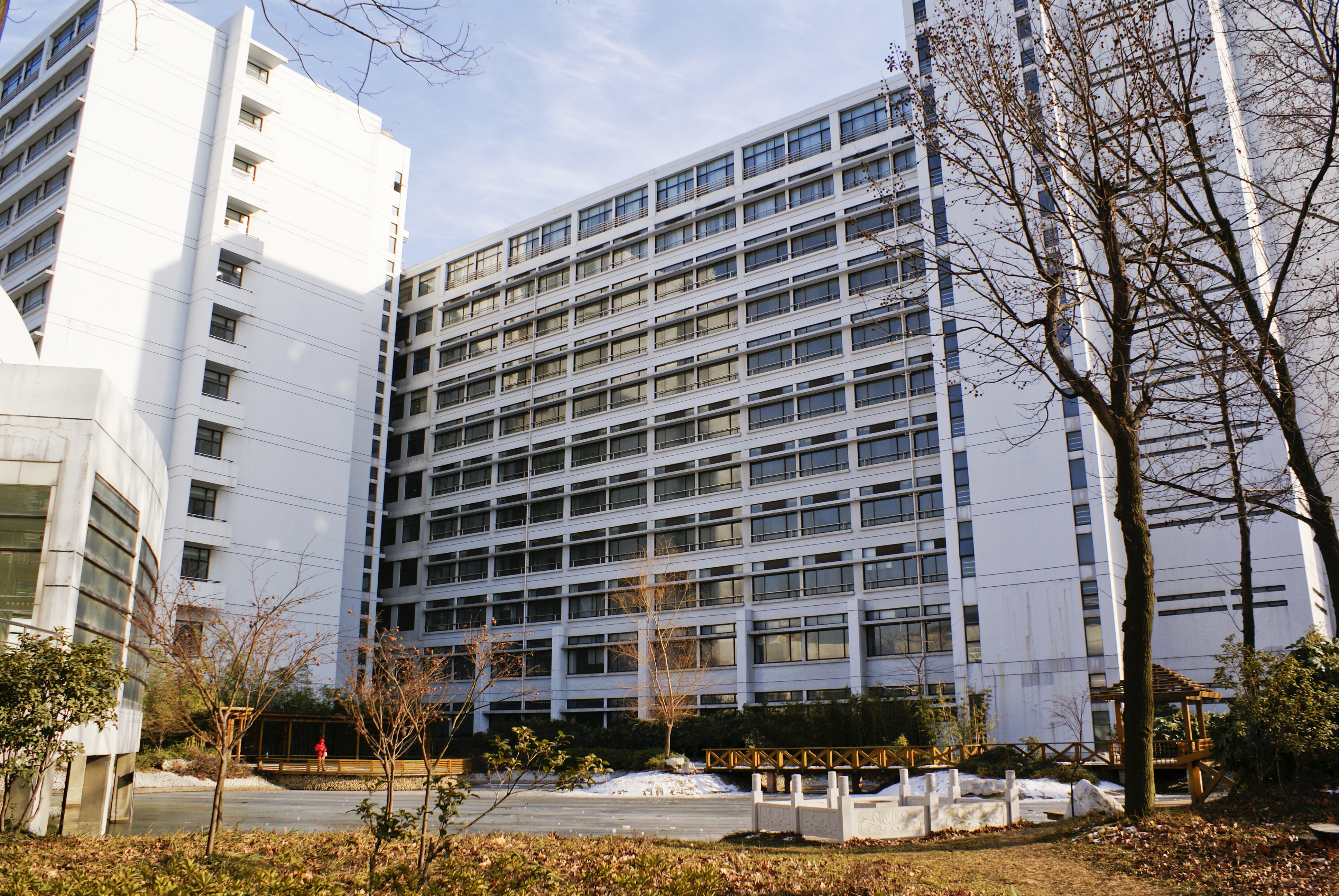 中文（中国大陆）: 南京林业大学的教学五号楼